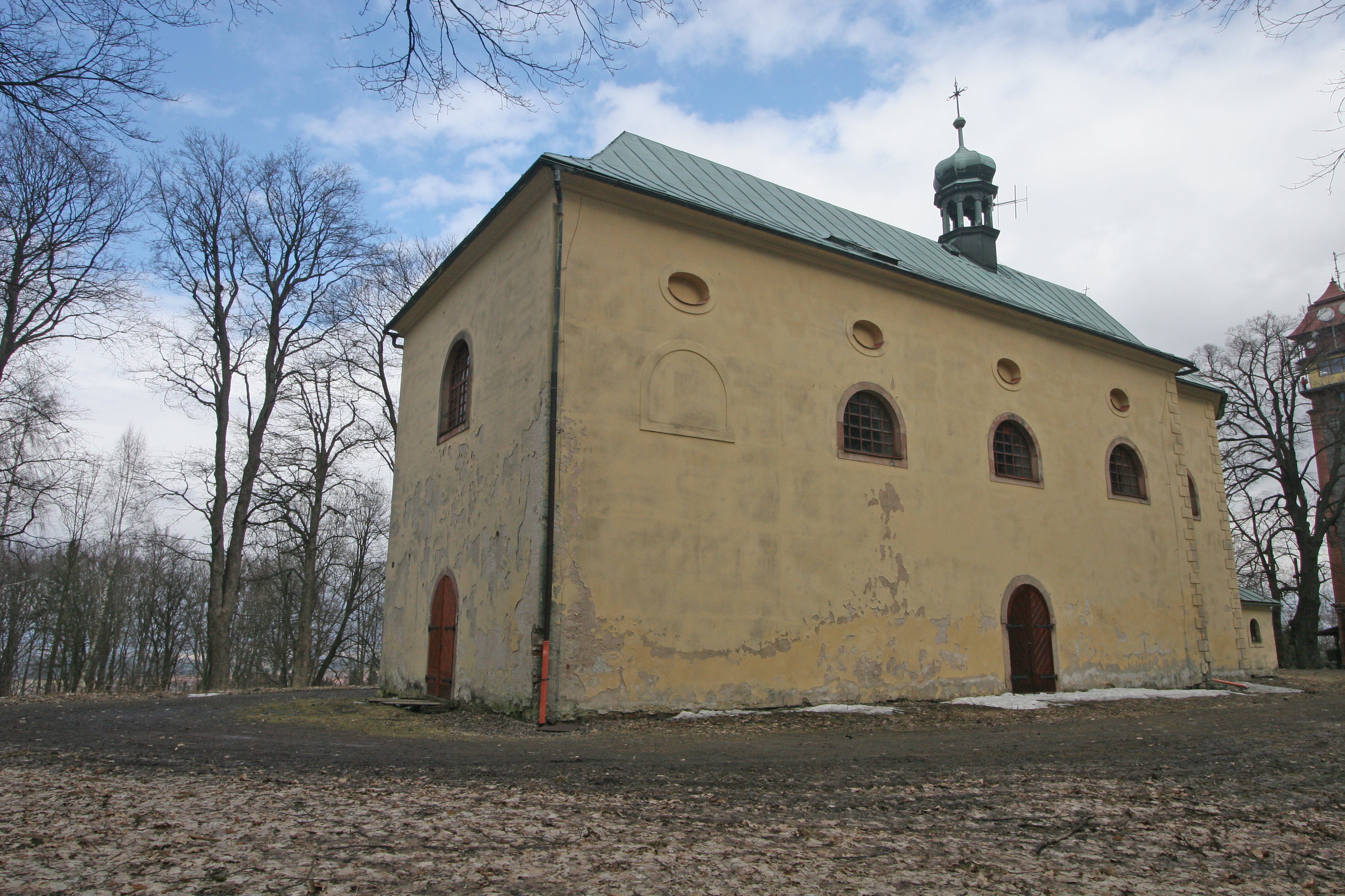 Kostel Proměnění Páně na hoře Tábor, s omezením: bez dřevěného kříže na lípě u kostela (Chlum), na hoře Tábor, Chlum